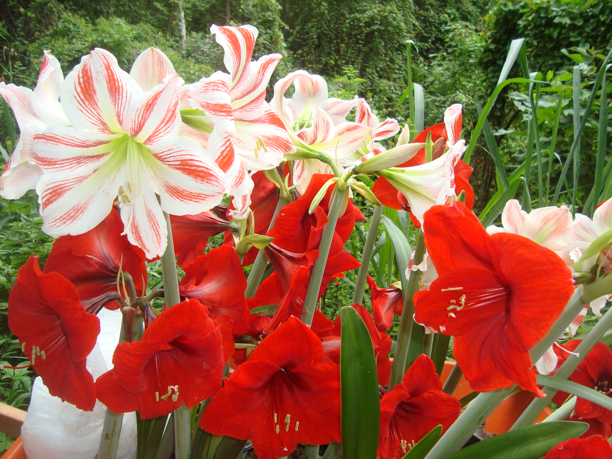 Flores cultivadas em Palmácia